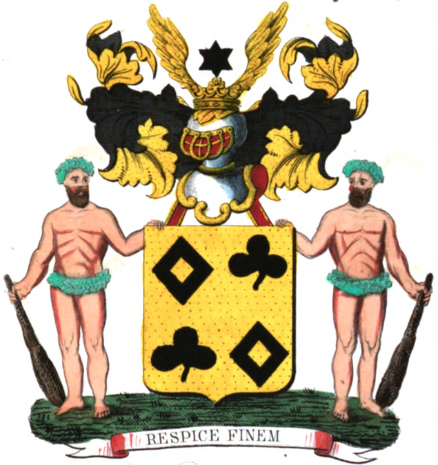 Armoiries de la famille de Wautier